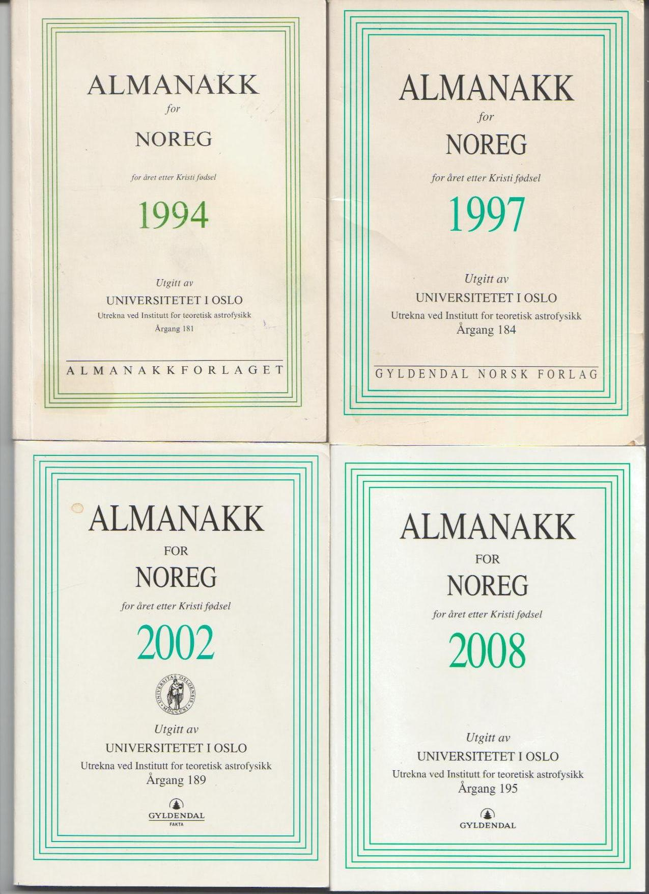 Almanakken - ei uforanderleg farsdagsgåve som «gir all den informasjonen trufaste lesarar er vane med å finne».